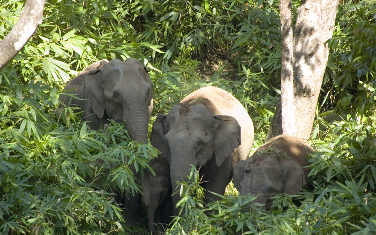 ആനക്കൂട്ടം